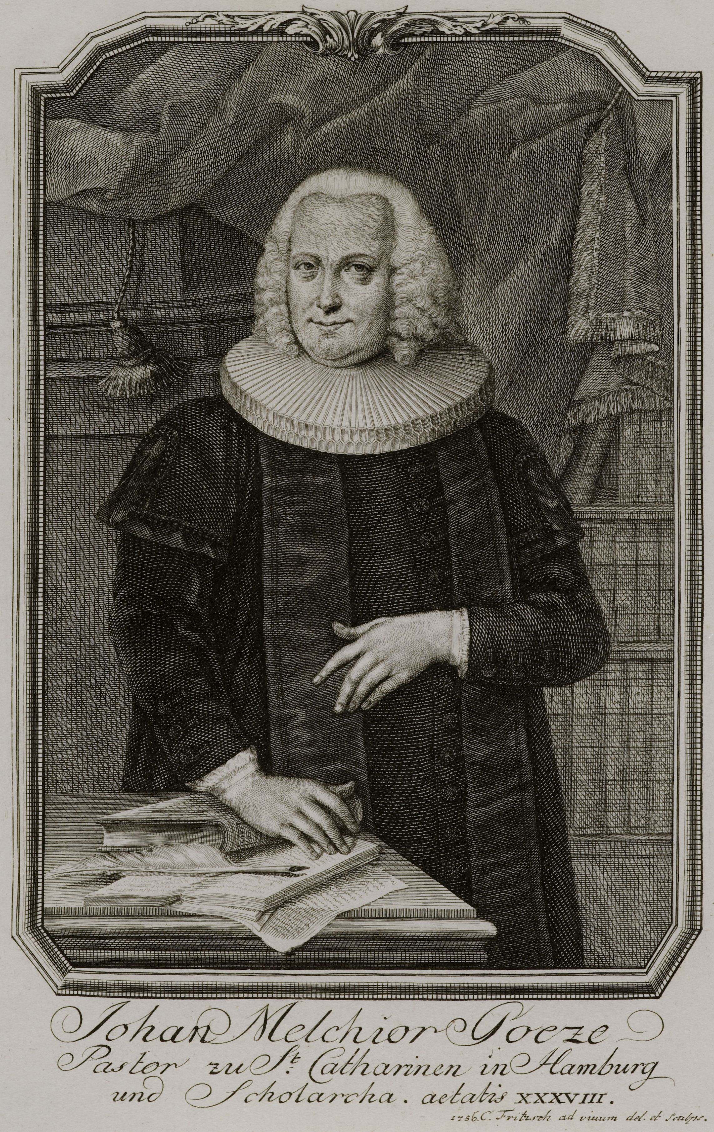 Johan Melchior Goeze